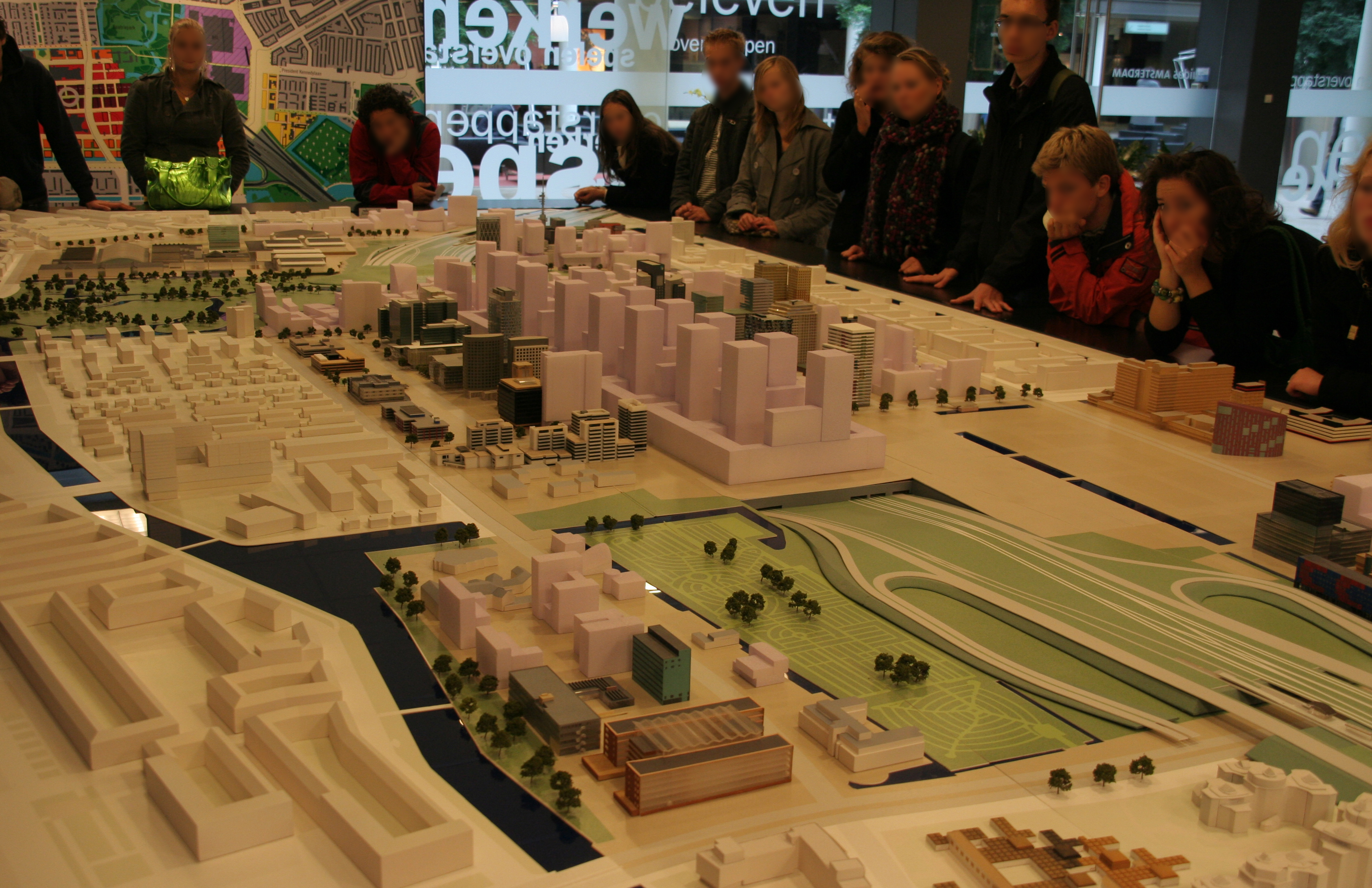 Maquette van Amsterdam Zuid; infrastructuur ondergronds.